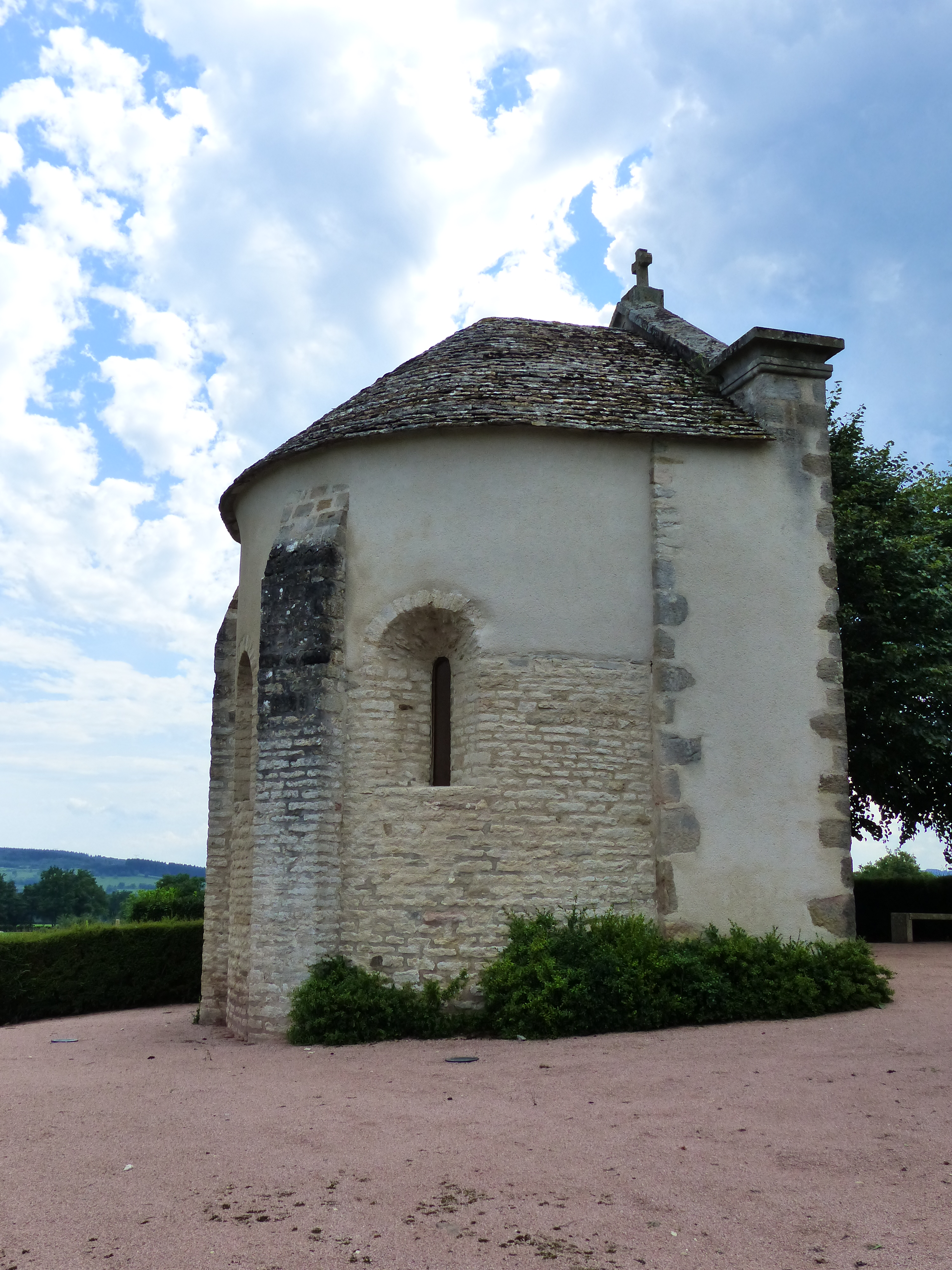 Chapelle Saint-Martin de Saint-Martin-La-Patrouille